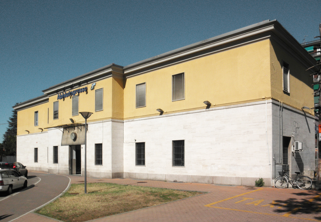 Stazione ferroviaria di Abbiategrasso.